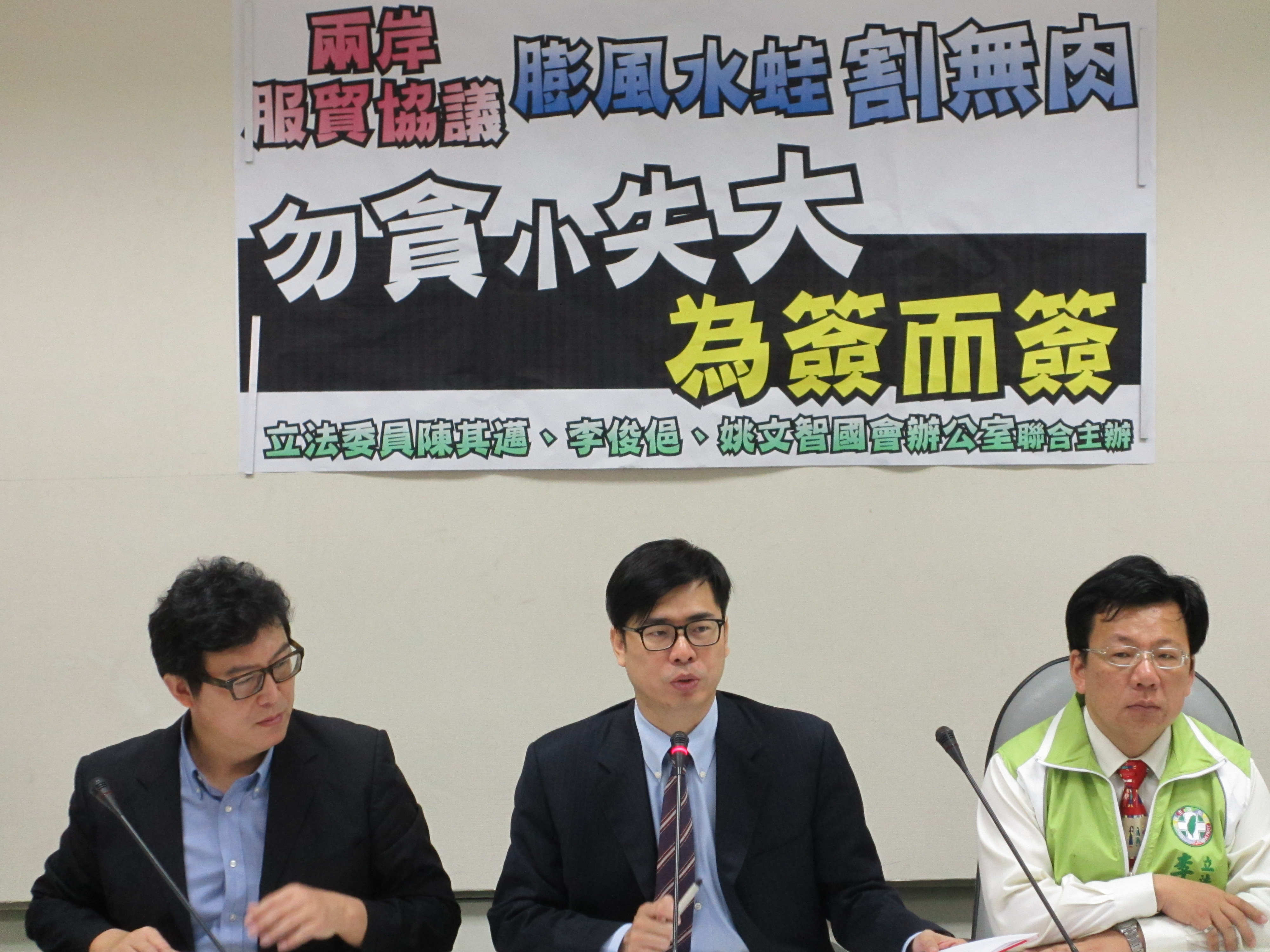 民主進步黨立法委員姚文智（左）、陳其邁（中）、李俊俋（右）就兩岸服務業貿易協議召開記者會。